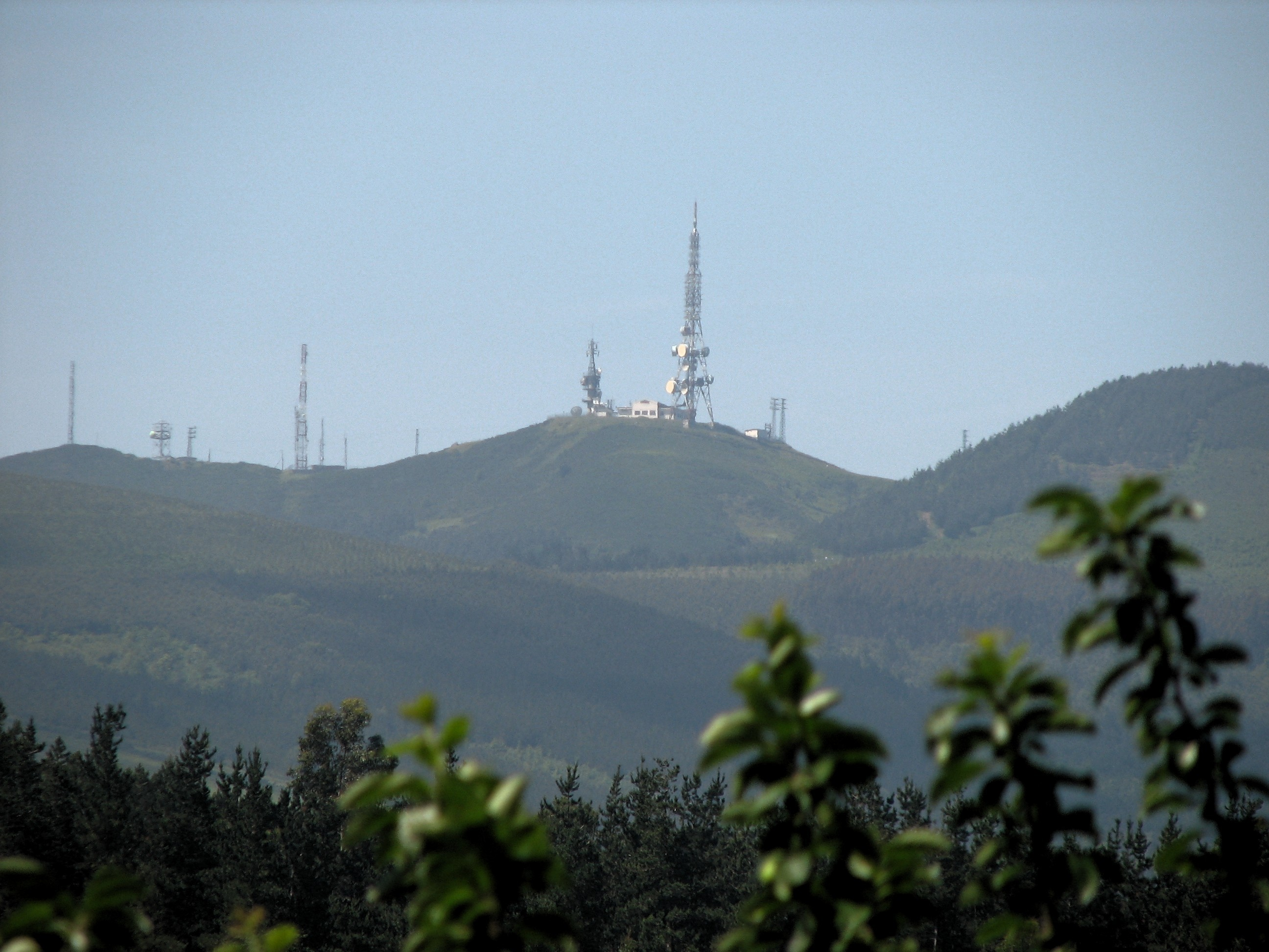 Sollubeko antenak